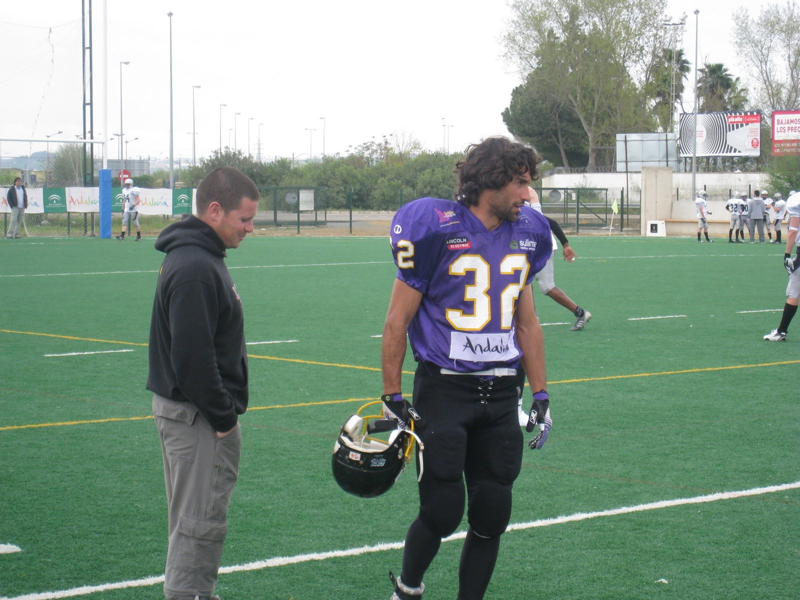 Antonio Laguna, Head Coach y linebacker de los Sevilla Linces